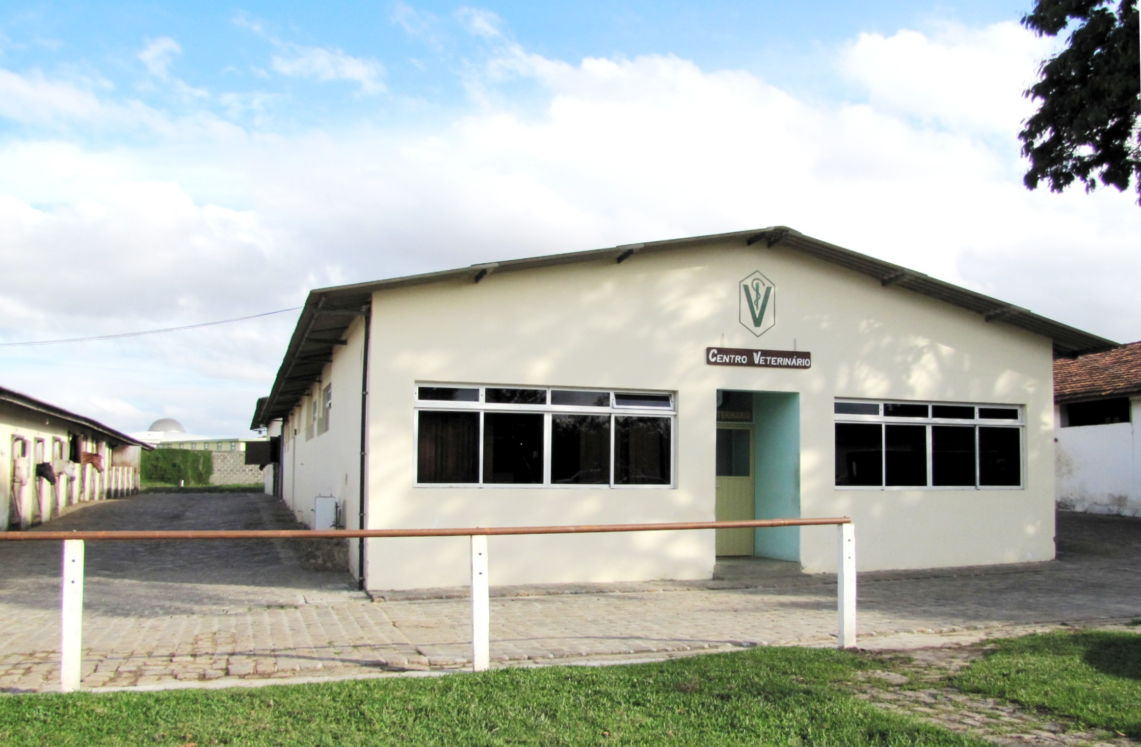 Centro Veterinário da Diretoria de Saúde da PMPR.